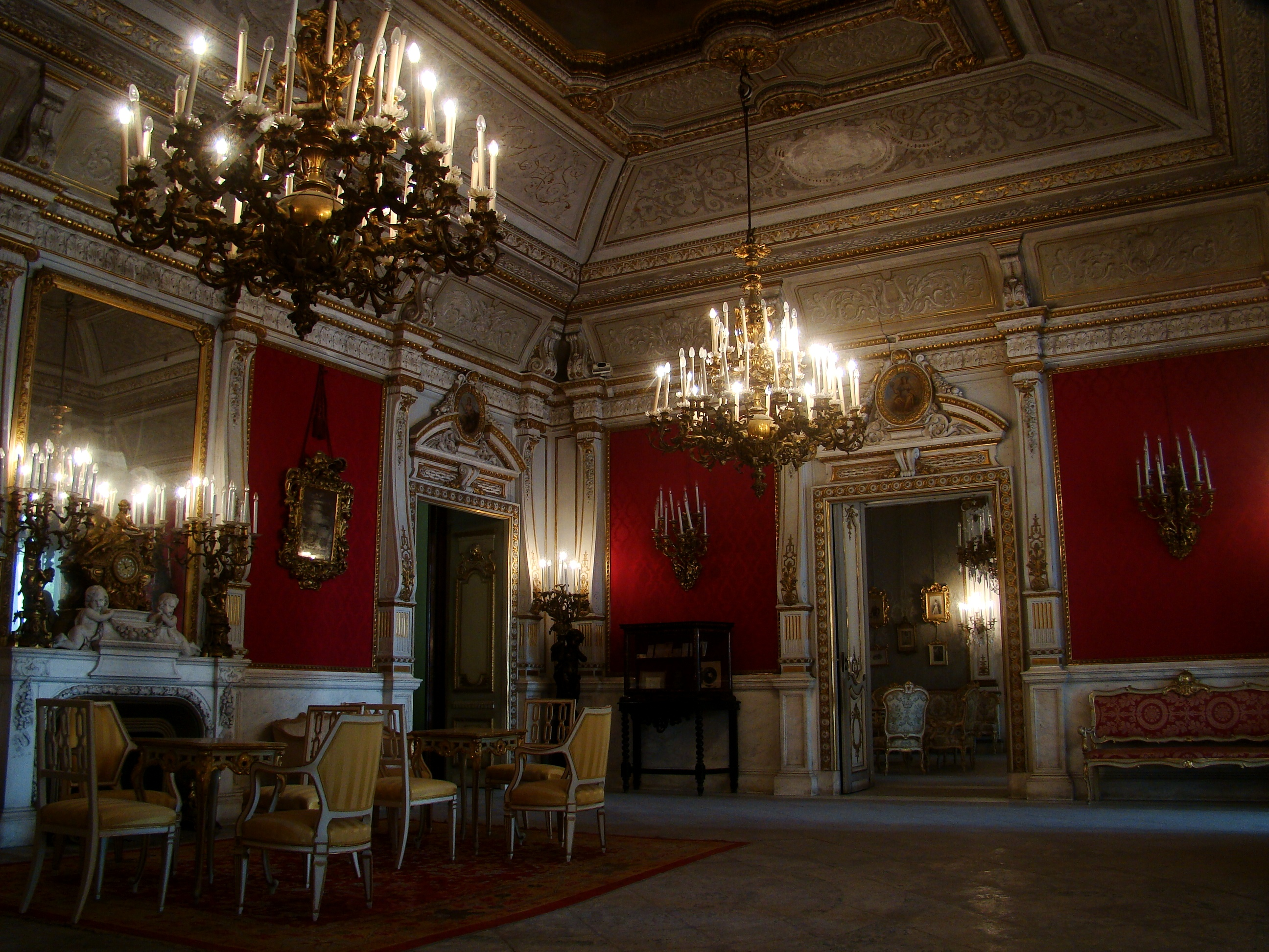 Museo Pignatelli - MIBAC This is a photo of a monument which is part of cultural heritage of Italy.